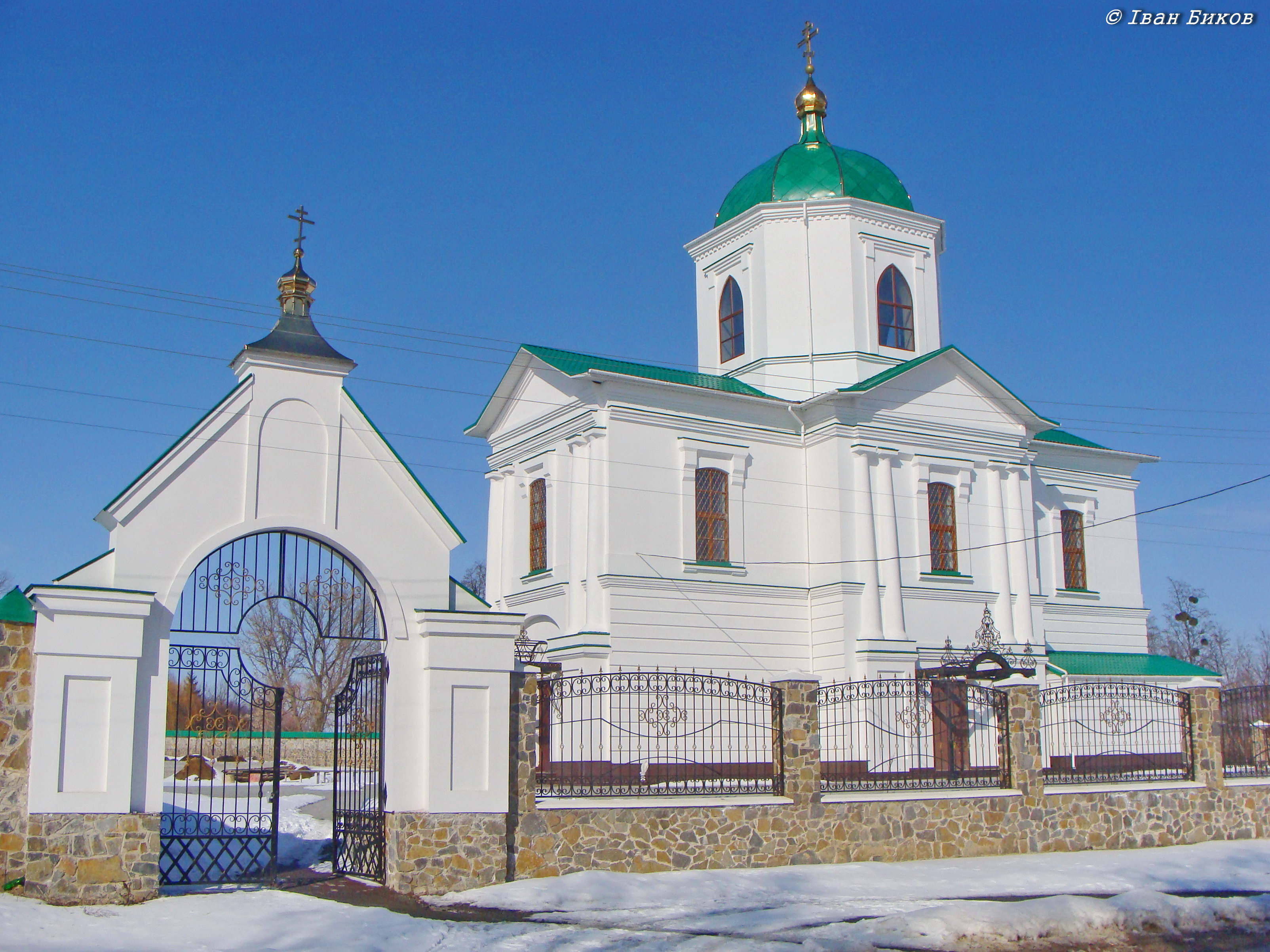 Троїцька церква (мур.), Руде Село